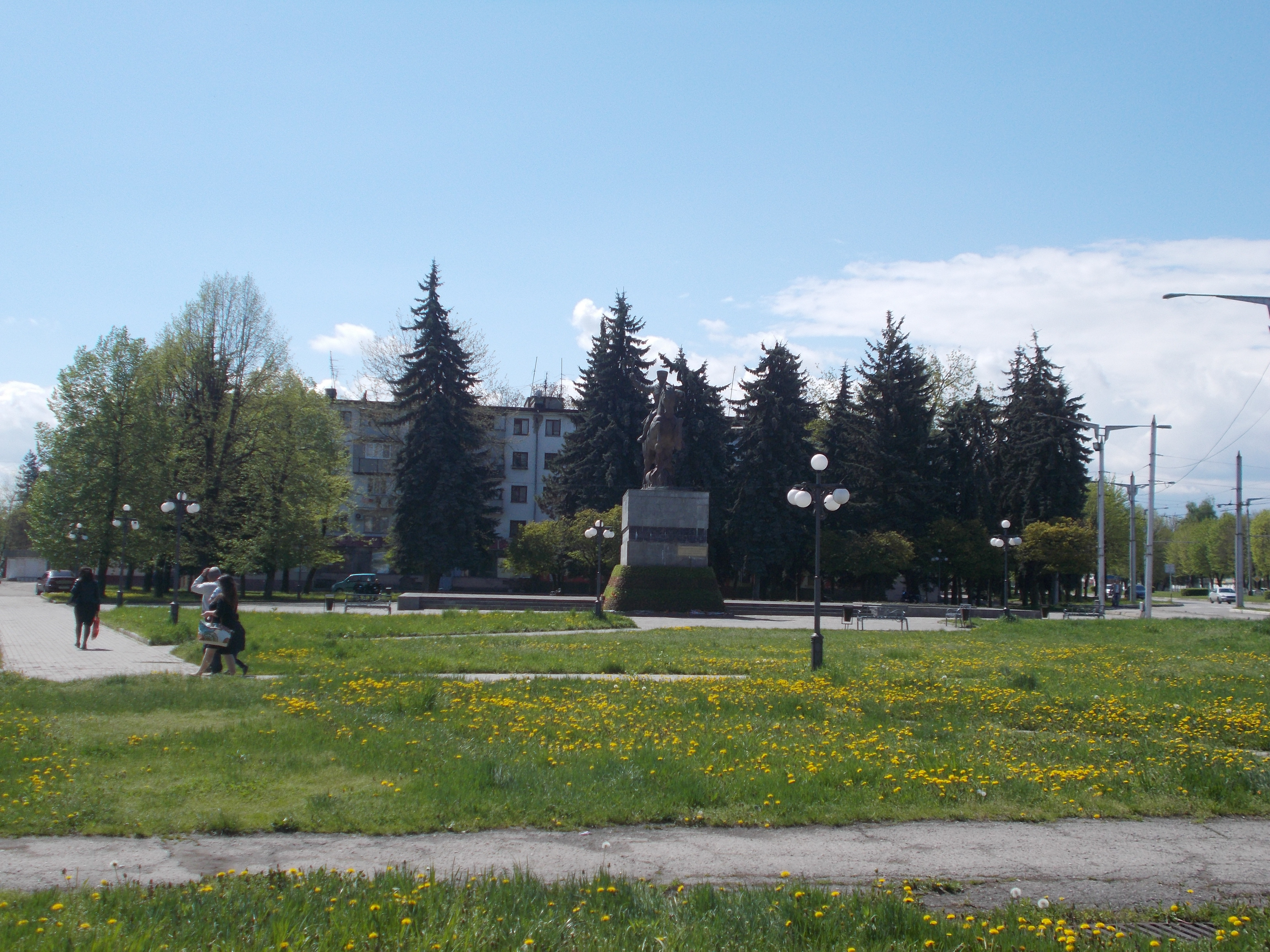 Нальчик, Нальчик This image is related to the protected area of Russia number 0700016